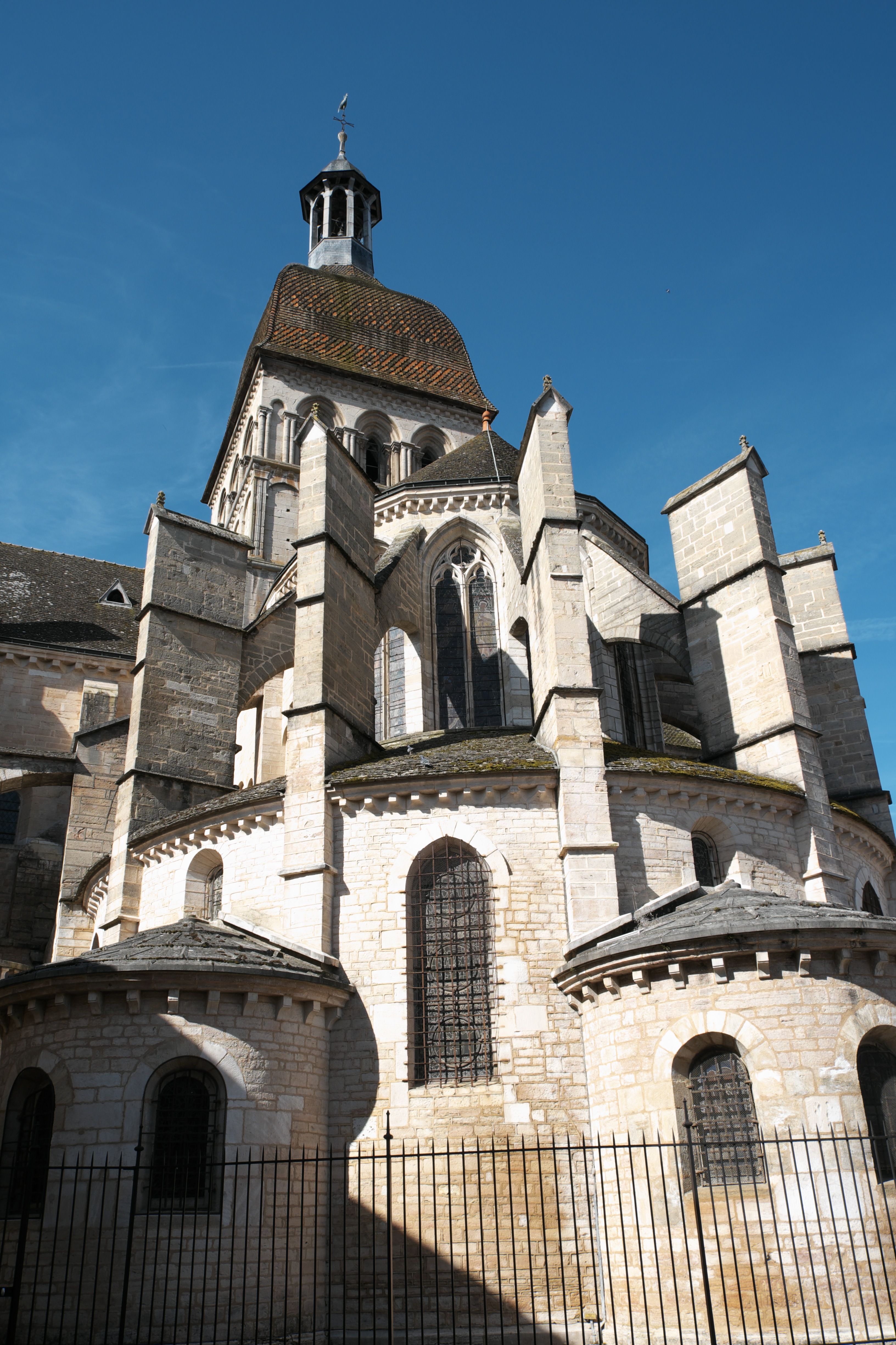 Katholische Pfarrkirche, ehemalige Stiftskirche, Notre-Dame in Beaune im Département Côte-d’Or (Bourgogne-Franche-Comté/Frankreich), Chorhaupt